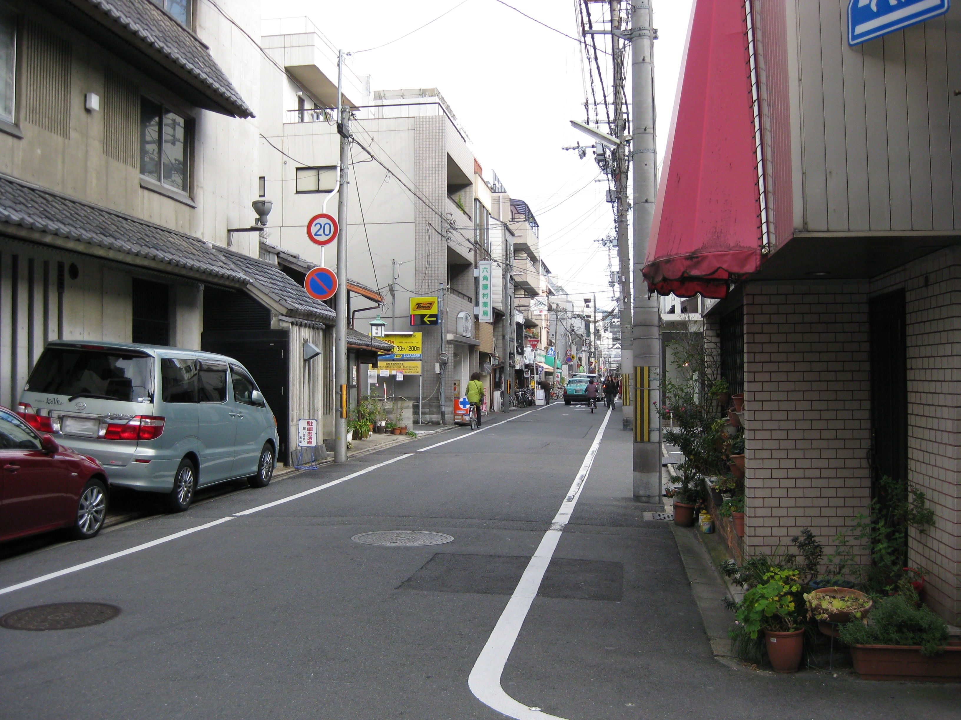 六角通。堺町通との交差点付近から東方向